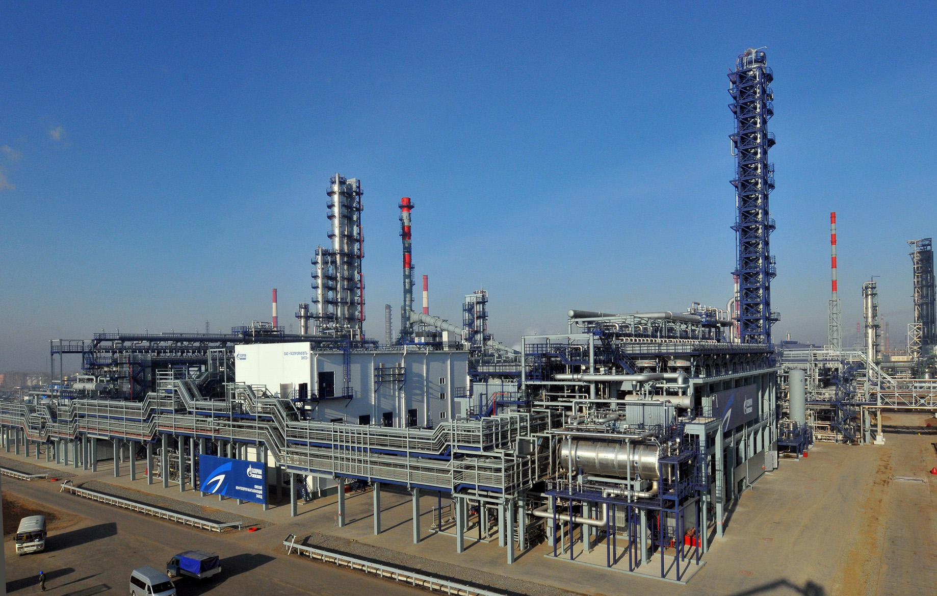 Установка изомеризации "Изомалк-2" ОАО "Газпромнефть-Омский НПЗ"